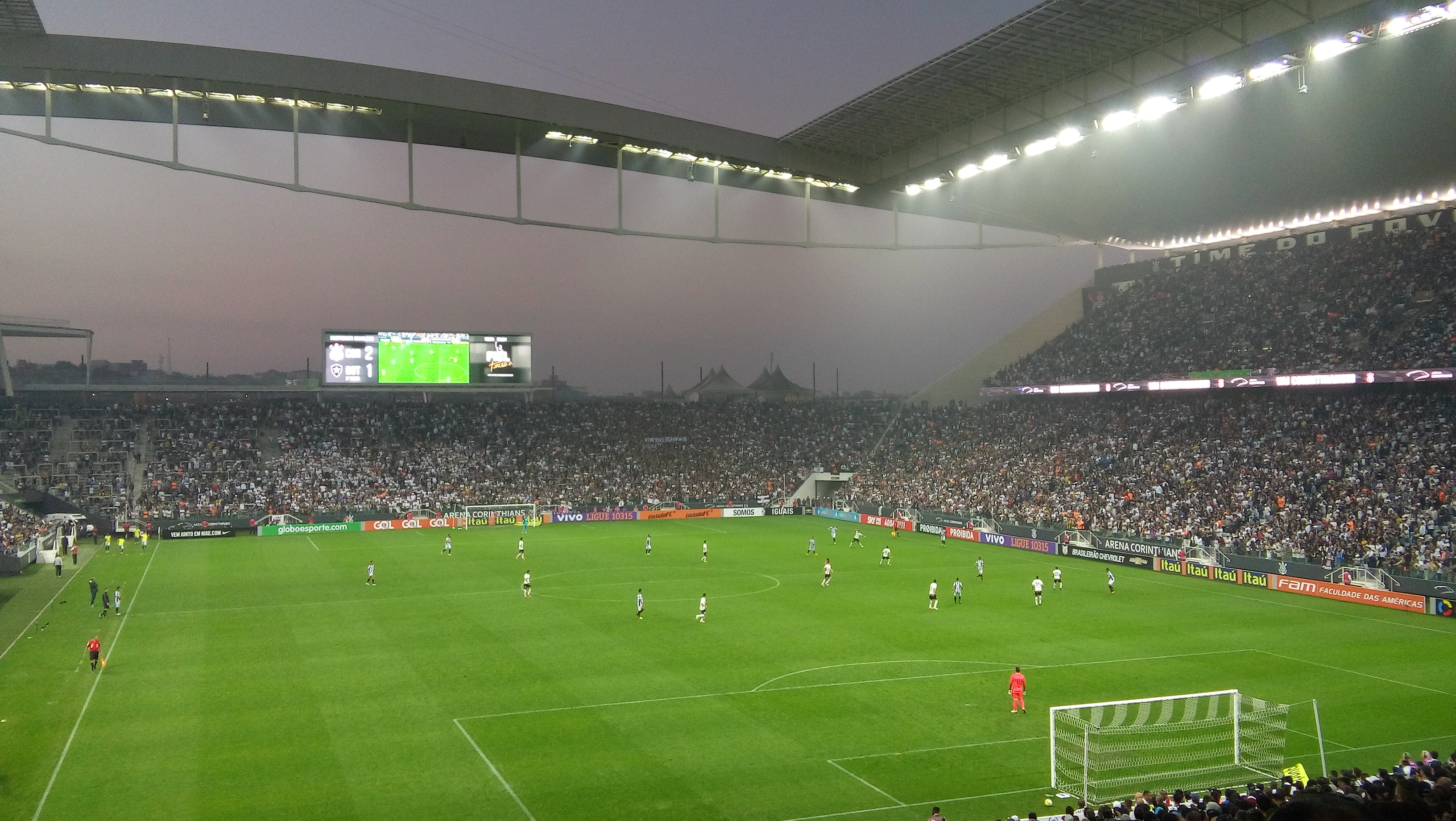 Clássico entre Corinthians x Botafogo Carioca